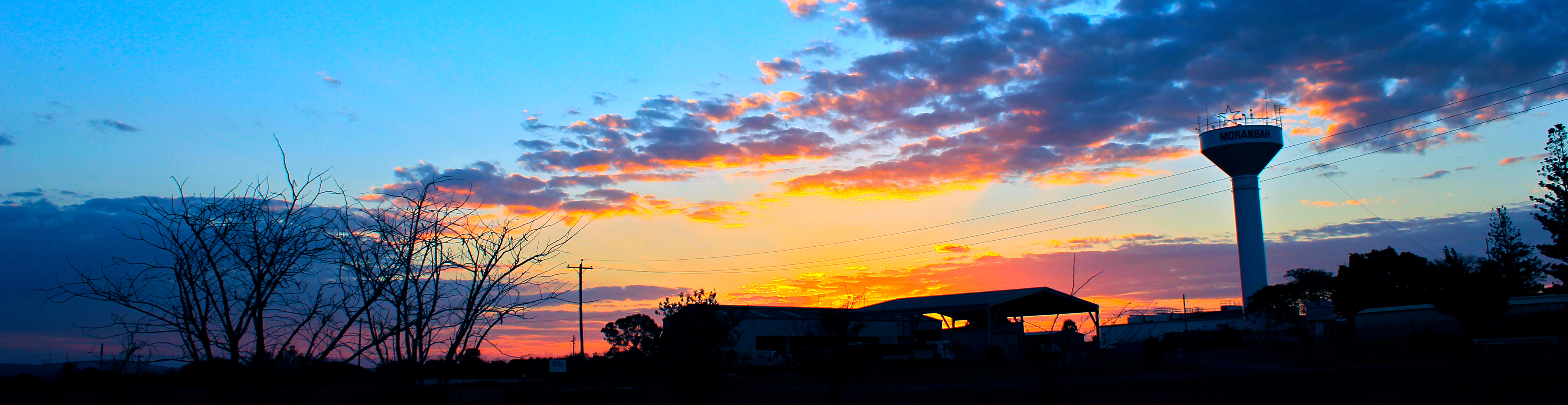 Moranbah Water Tower